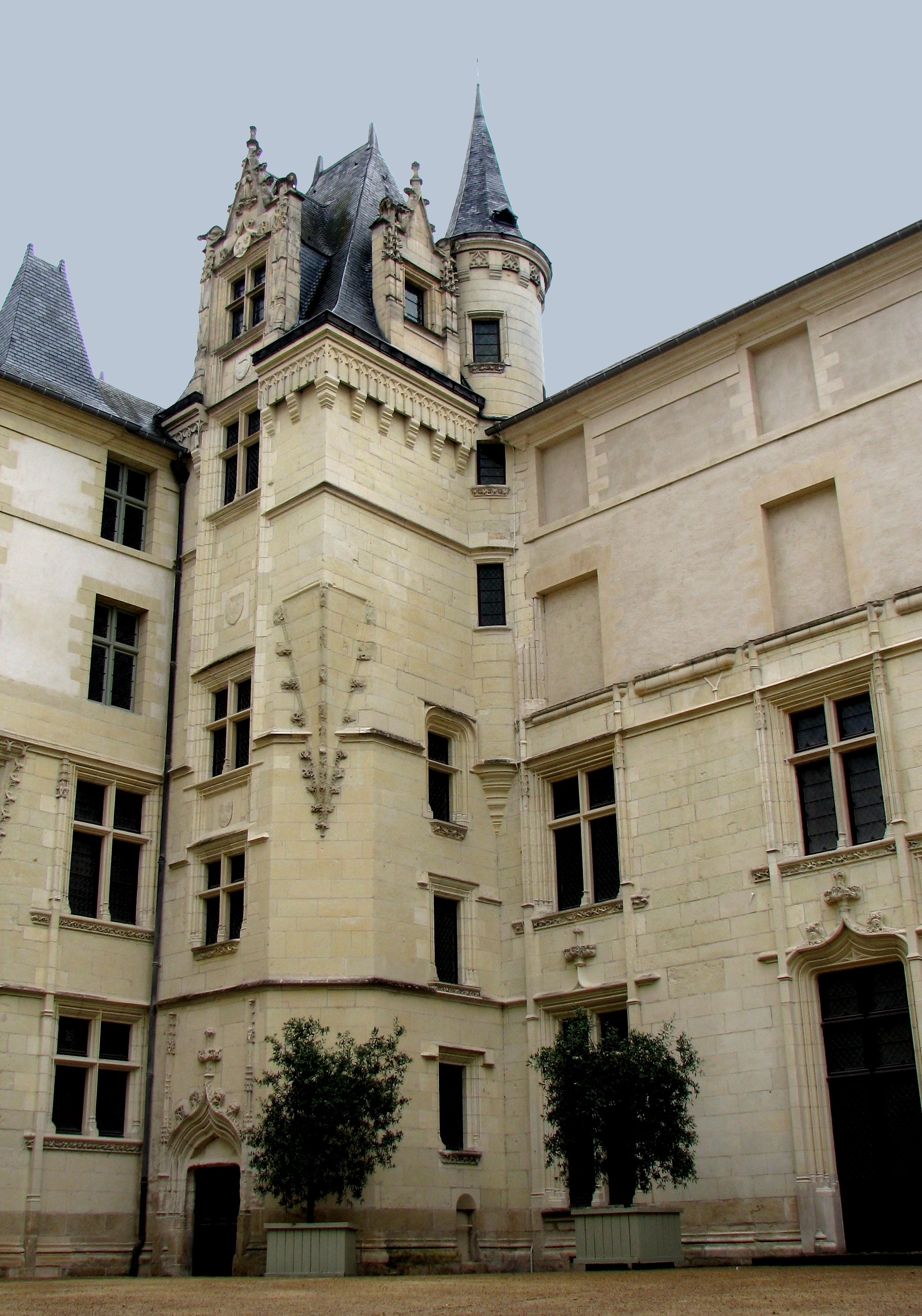 Musée des beaux-arts (derrière la grille).